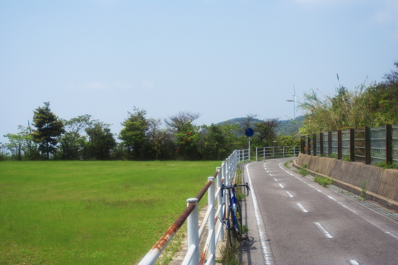 長崎県道300号長崎野母崎自転車道線「野母崎サイクリング道路」